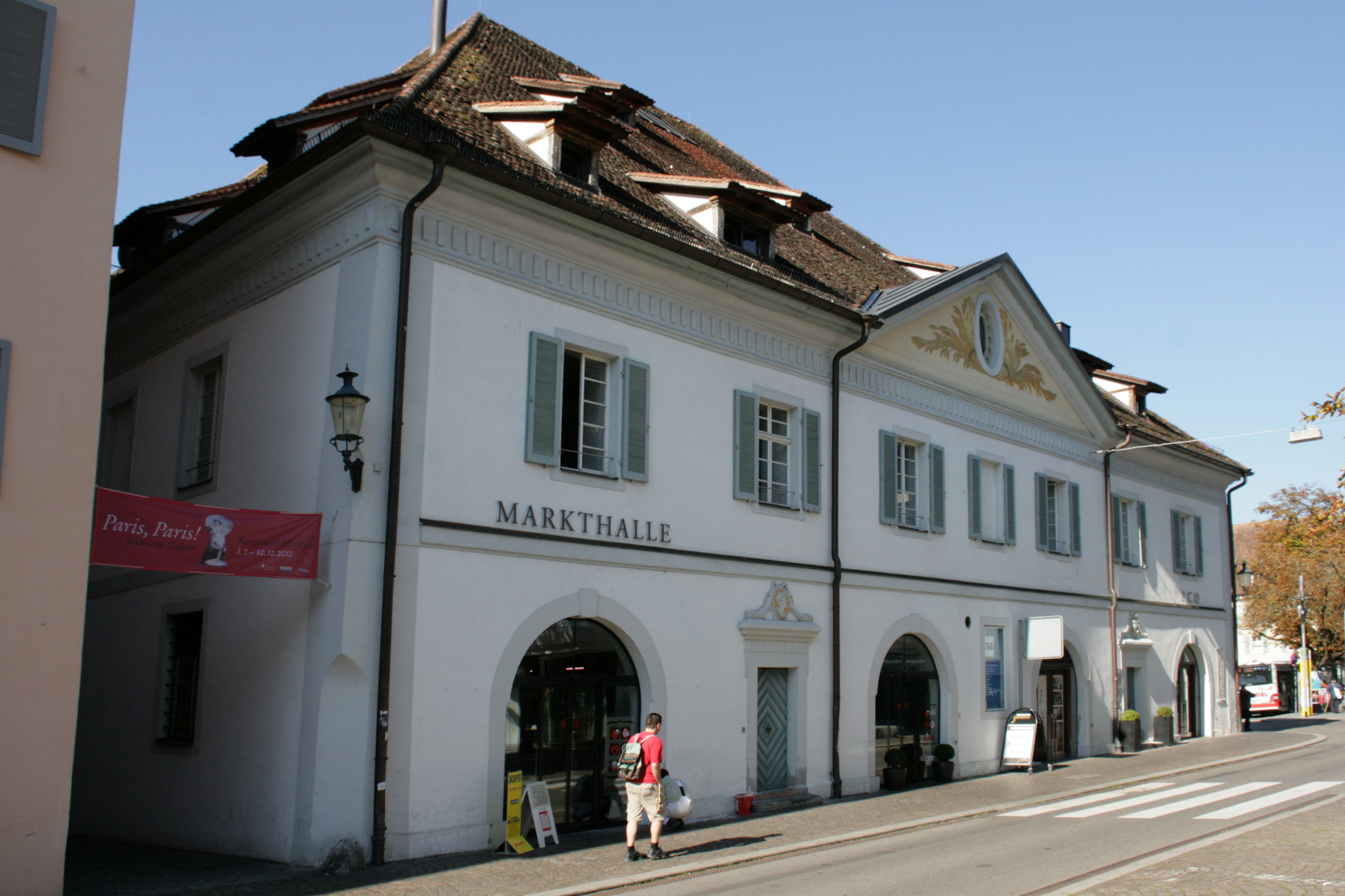 Greth am Landungsplatz in Überlingen